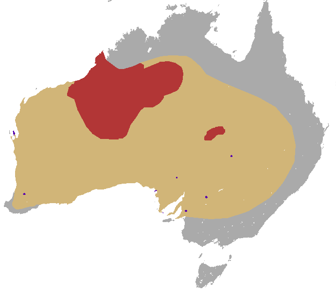 מפת תפוצה של הבילבי הענק